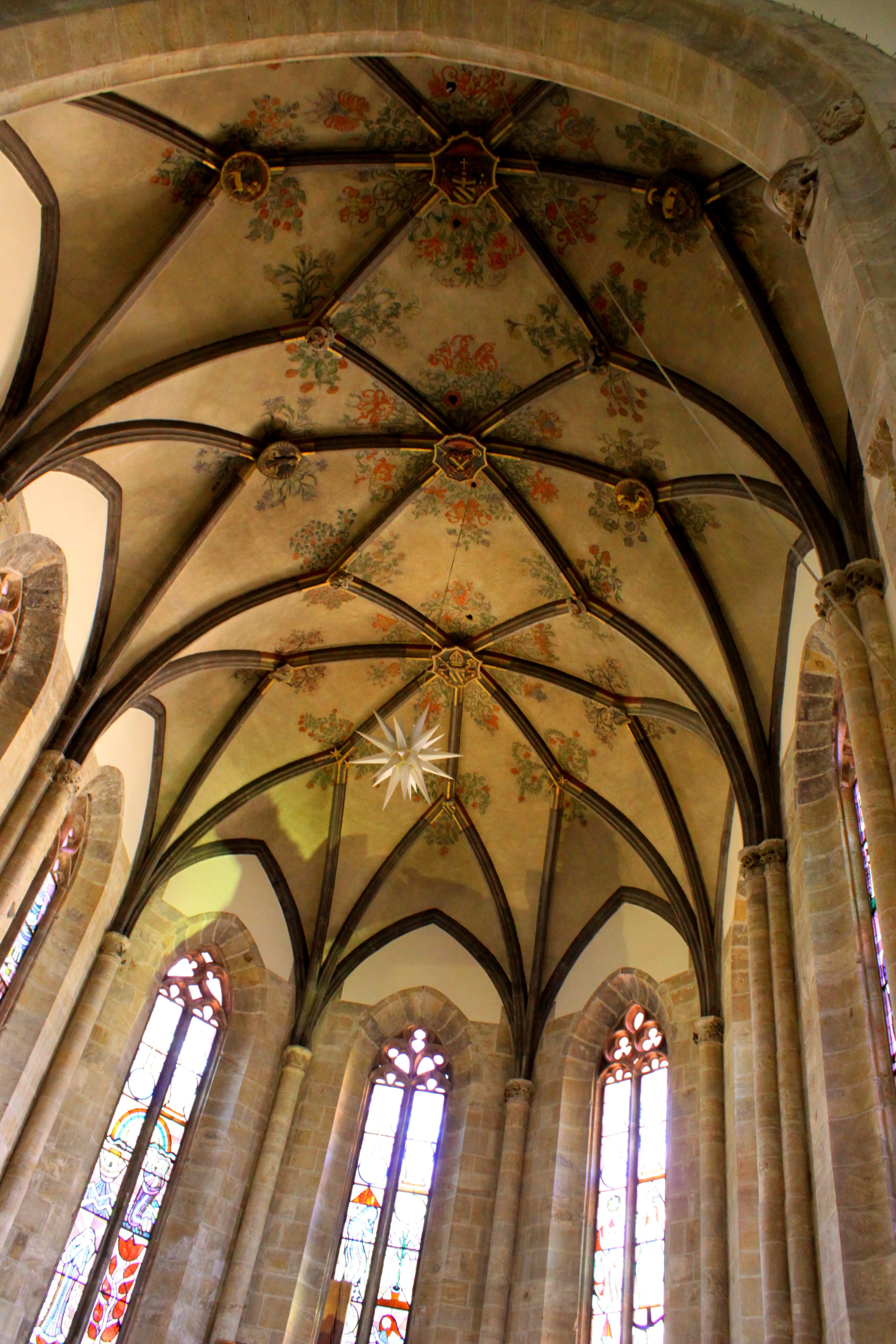 Suisse, canton du Valais, Sion, Eglise Saint-Théodule : du nom du premier évêque de Sion. Magnifique choeur de style gothique flamboyant germanique.